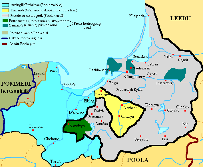 Ida- ja Lääne-Preisimaa 1525. aasta paiku. Et nimedega on sealkandis palju segadust, olgu antud ka kohtade alternatiivsed nimekujud: Balga, praegu hävinud linnusekoht; Braniewo, saksa Braunsberg; Bytów, saksa Bütow; Chełmno, saksa Kulm/Culm; Elbląg, saksa Elbing; Ełk, saksa Lyck; Fischhausen, vene Primorsk; Gdańsk, saksa Danzig; Giżycko, saksa Lötzen; Insterburg, vene Tšernjahhovsk; Kętrzyn, saksa Rastenburg; Klaipėda, saksa Memel; Kwidzyn, saksa Marienwerder; Königsberg, vene Kaliningrad; Labiau, vene Polessk; Lębork, saksa Lauenburg; Lidzbark (Warmiński), saksa Heilsberg; Malbork, saksa Marienburg; Neuhausen, vene Gurjevsk; Olecko, saksa Oletzko; Olsztyn, saksa Allenstein; Ostróda, saksa Osterode; Pasłęk, saksa Preussisch Holland; Pisz (Jànsbork), saksa Johannisburg; Preussisch Eylau, vene Bagrationovsk; Puck, saksa Putzig; Przezmark, saksa Preussisch Mark; Ragnit, vene Neman; Schaaken, vene Nekrassovo; Szczytno, saksa Ortelsburg; Tapiau, vene Gvardeisk; Tilsit, vene Sovetsk, poola Tylza, leedu Tilžė; Toruń, saksa Thorn; Tuchola, saksa Tuchel.